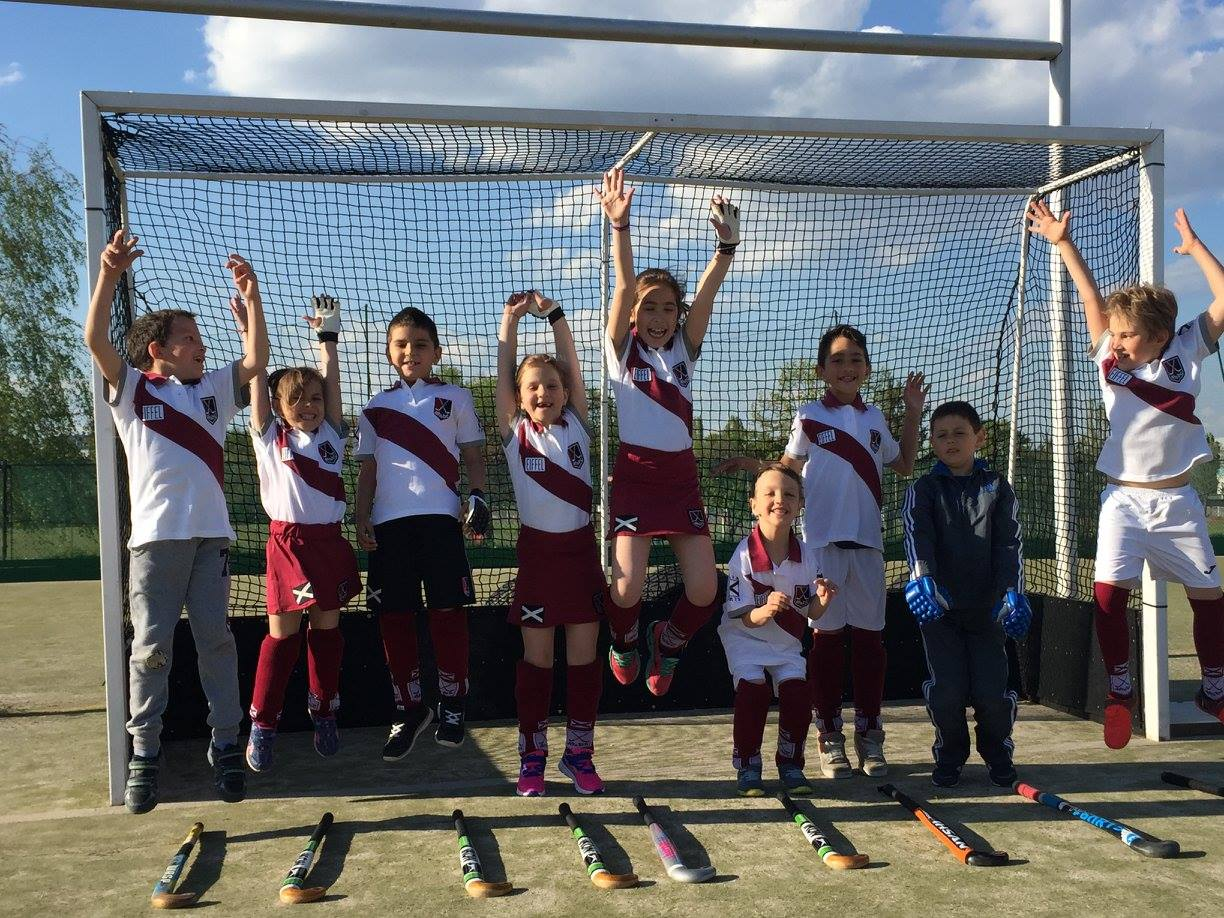 Ученици от 55 СУ „Петко Каравелов“, трениращи хокей на трева